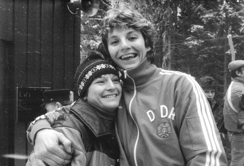 Ute Oberhoffner, Steffi Martin ADN-ZB Schaar wo-30.12.1984-Bez. Suhl: DDR-Meisterschaften im Rennschlittensport in Oberhof-Mit nur zwei Hunderstelsekunden Vorsprung belegte Ute Oberhoffner ASK (links) den 1. Platz bei den Damen vor der Olympiasiegerin Steffi Martin.